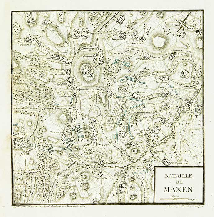 Битва при Максене